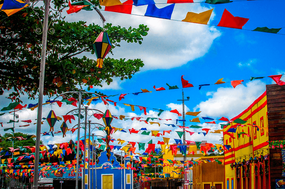 decoração de Caruaru